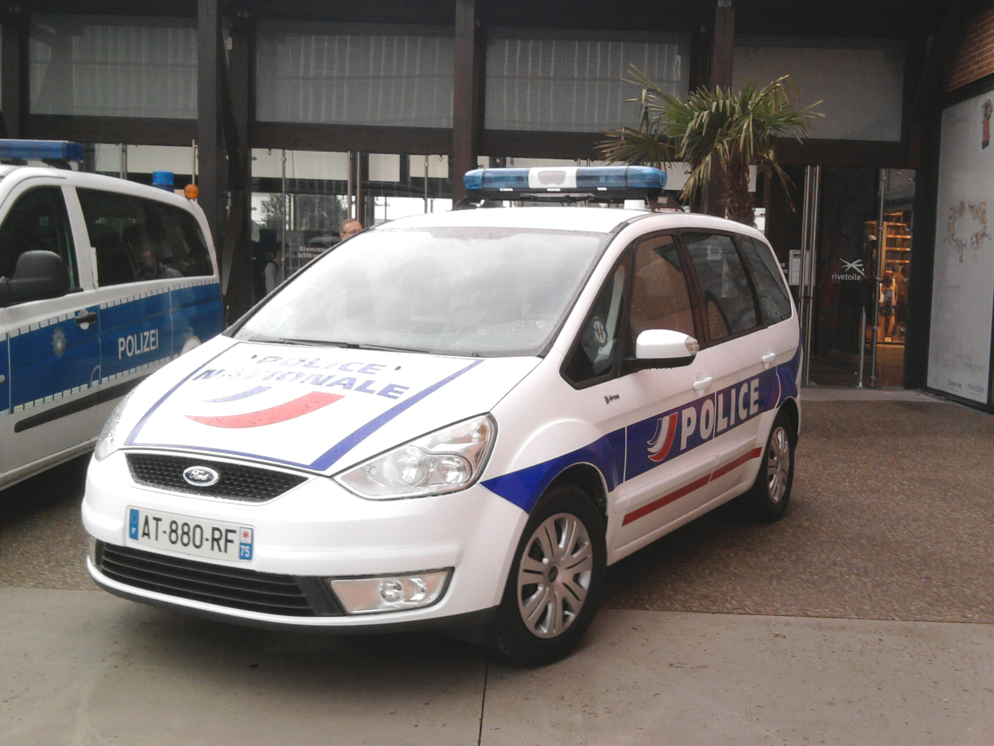 Ford Galaxy de la PAF (Police aux Frontières) à Strasbourg